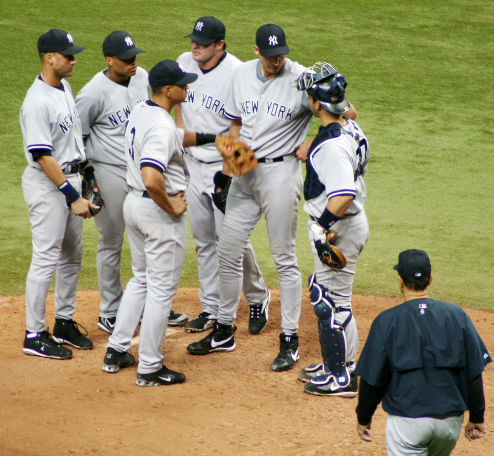 Photograph taken by Googie Man 19:54, 26 September 2006 . . Googie man . . 1000×923 (407 KB)